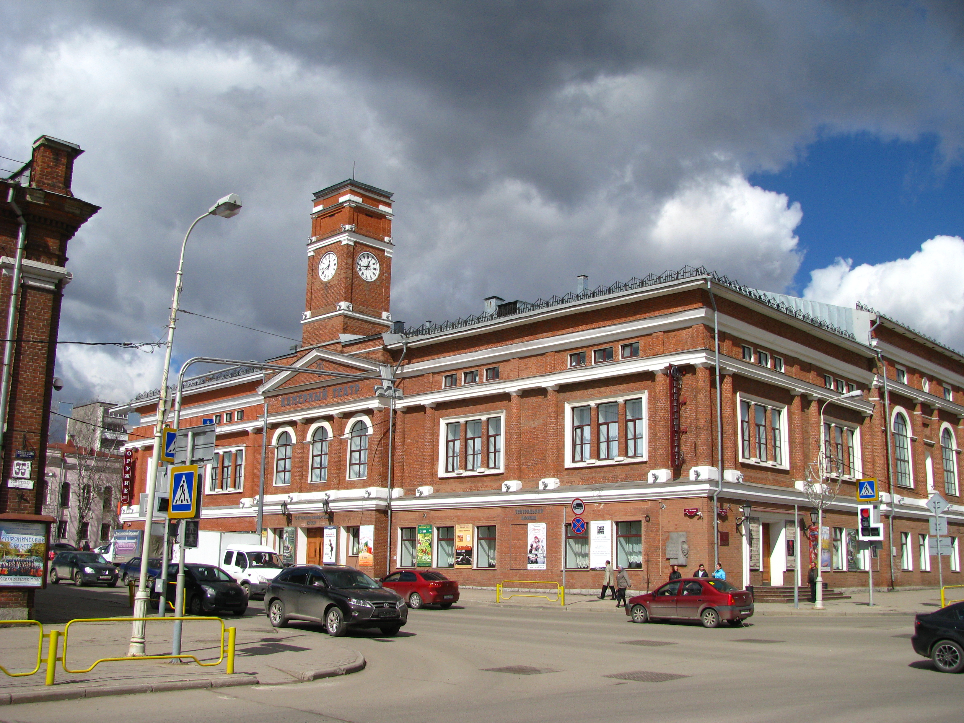 Театр ведёт свою историю с 60-х годов XIX столетия, когда при Общественном собрании из «господ–любителей» был образован музыкально–драматический кружок, объединивший представителей интеллигенции, купечества, дворянства. Основу репертуара составили водевили, шутки и комедии, популярные не только в провинции, но и в столичных театрах. Среди постановок были такие пьесы, как «Ревизор» Н. В. Гоголя, «Женитьба Бальзаминова», «Лес», «Волки и овцы», «Не в свои сани не садись» А. Н. Островского, «Злоумышленники» А. П. Чехова.